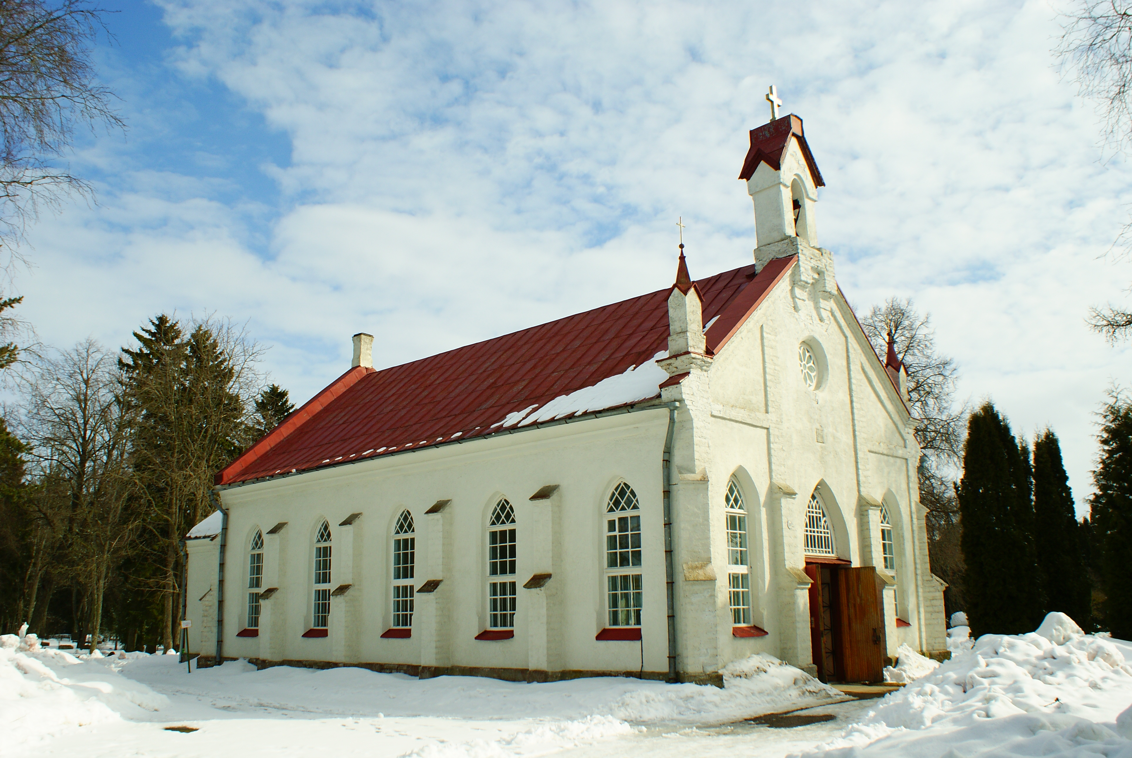 Ranna kirik